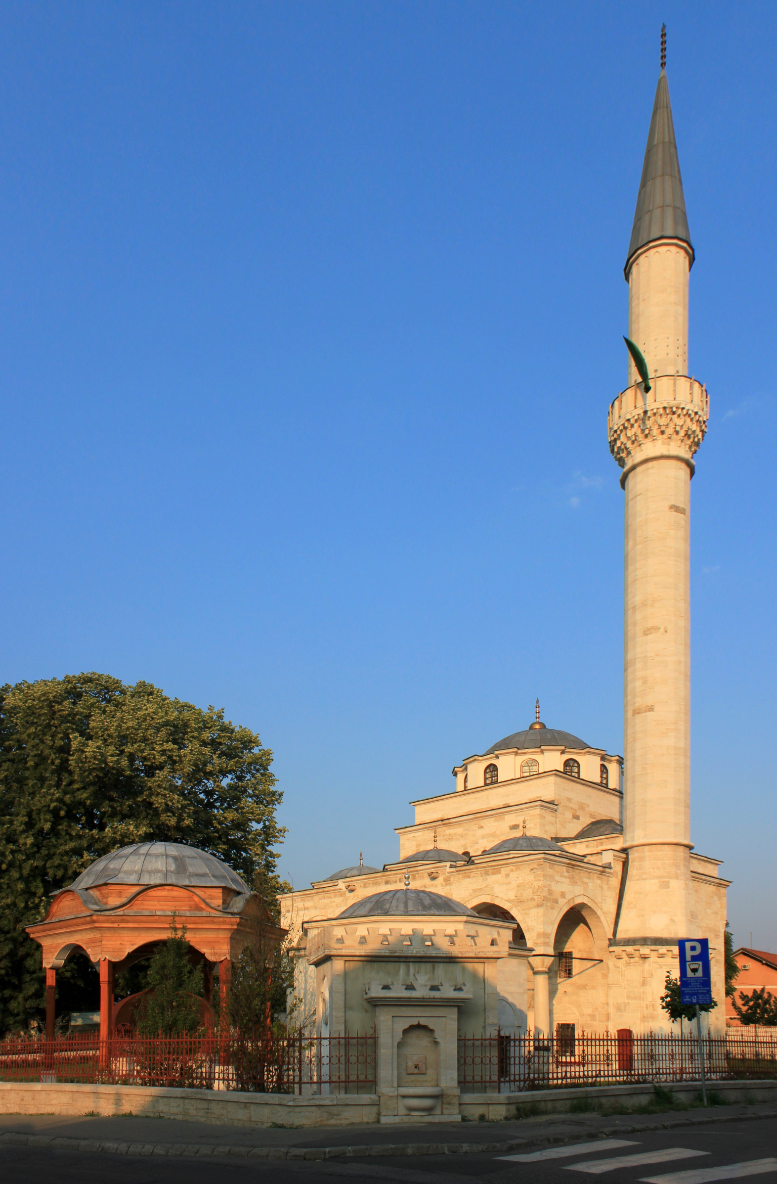 Die wiederaufgebaute Ferhadija-Moschee in Banja Luka.